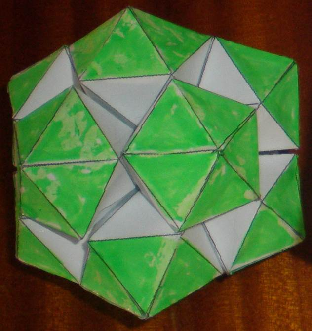 A középső ikozaéder látványa